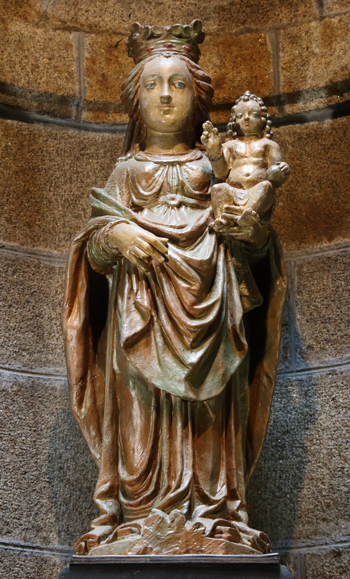 Chapelle Notre-Dame-de-Bon-Secours à Fougères (35). Statue de la Vierge à l'Enfant ayant orné précédemment la Porte Roger.